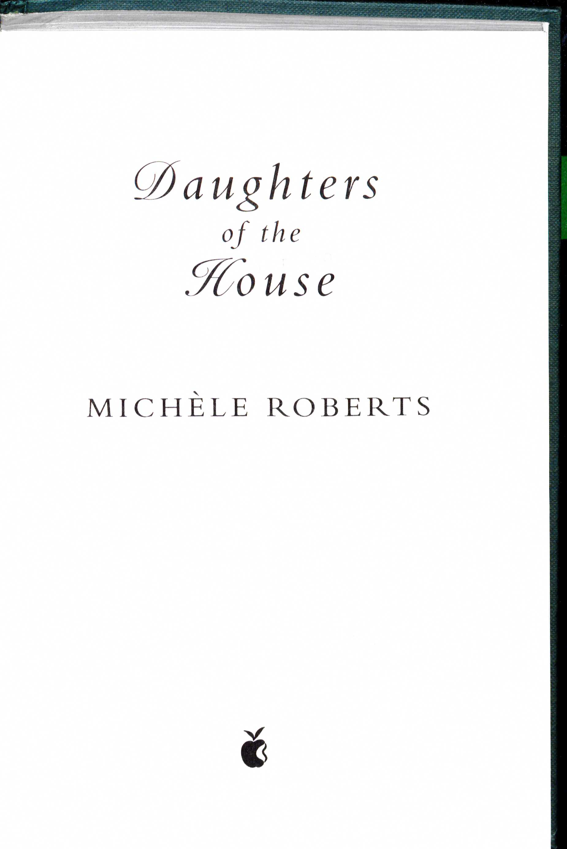 Michèle Roberts Daughters of the House. London : Virago, 1992